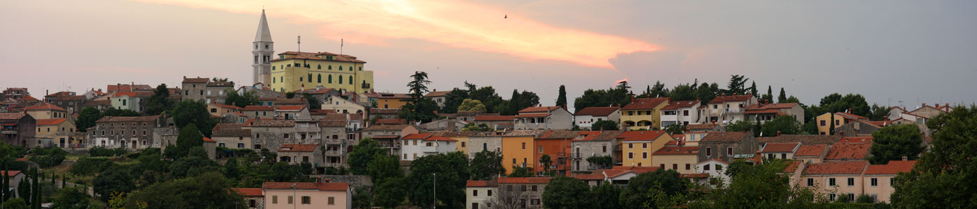 Panoramica di Orsera/Vrsar - Croazia